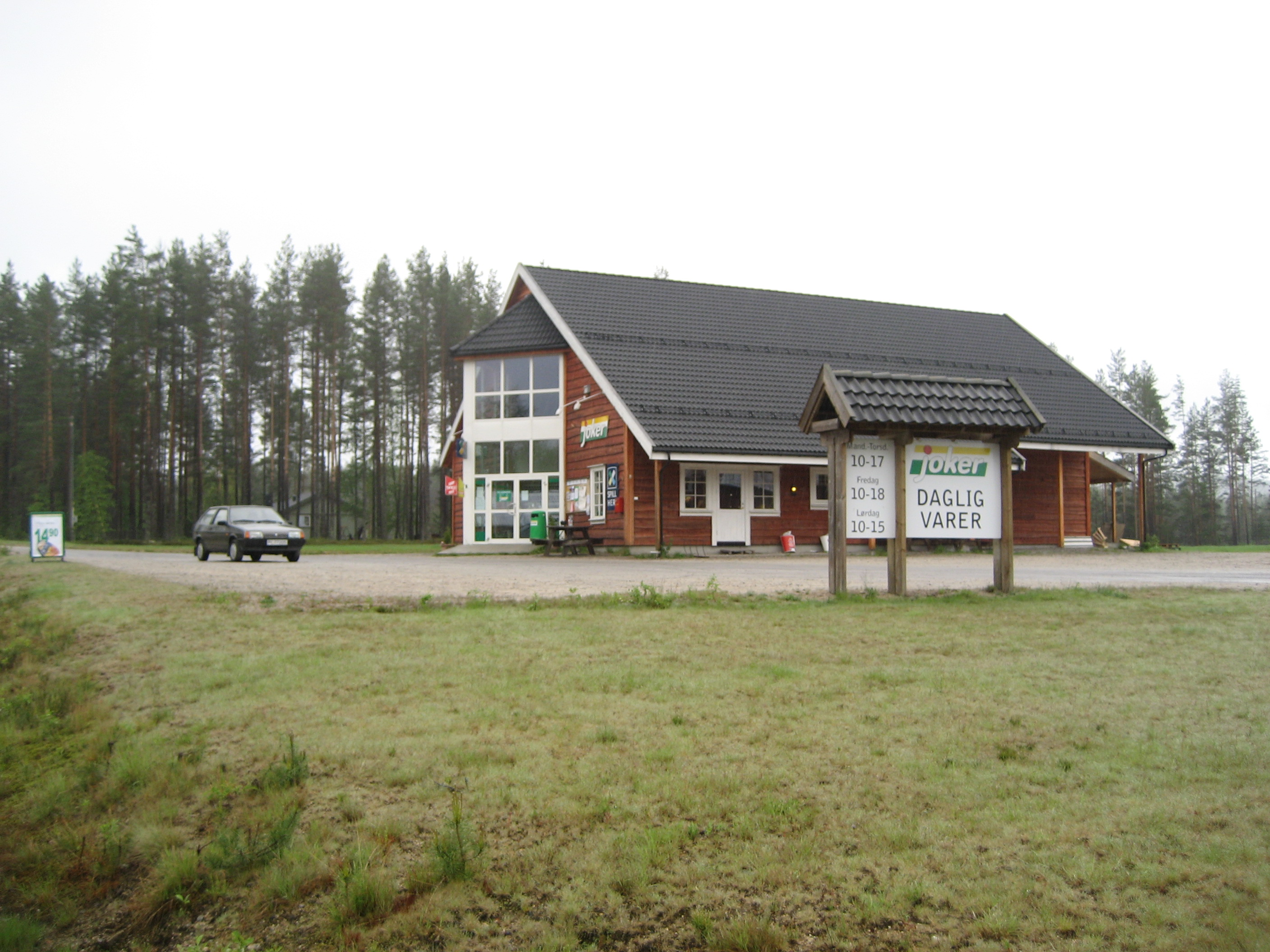 Dølemo Nærmat